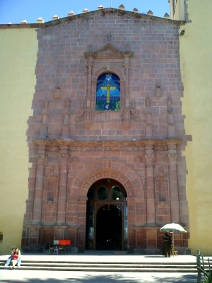 Fachada Iglesia San Miguel Arcángel, Ixmiquilpan, Hidalgo